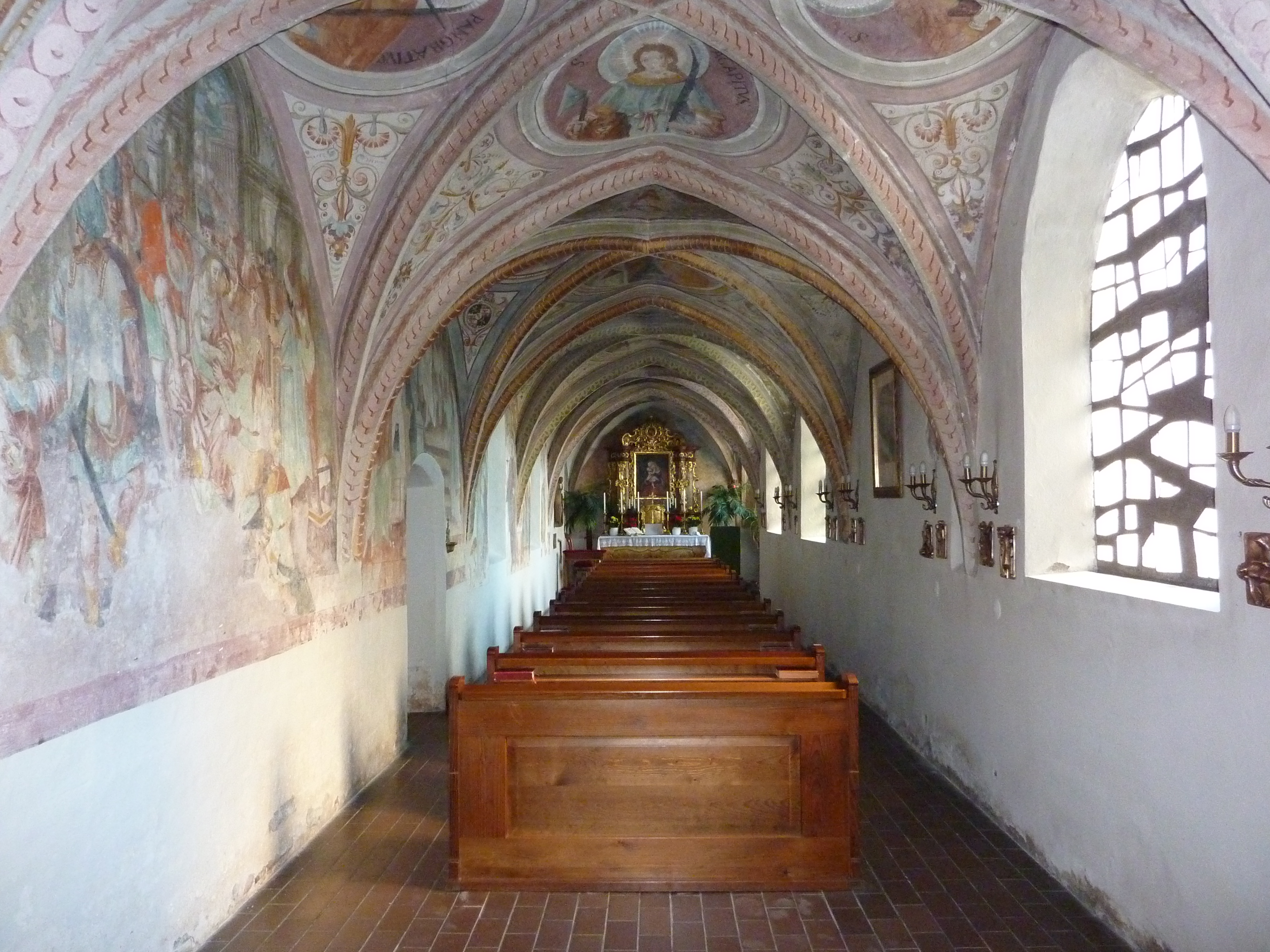 Pfarrkirche in Mattighofen in Oberösterreich - nördlichwestlich an die Pfarrkirche anschließende Kapelle; Teil des Propsteigebäudes